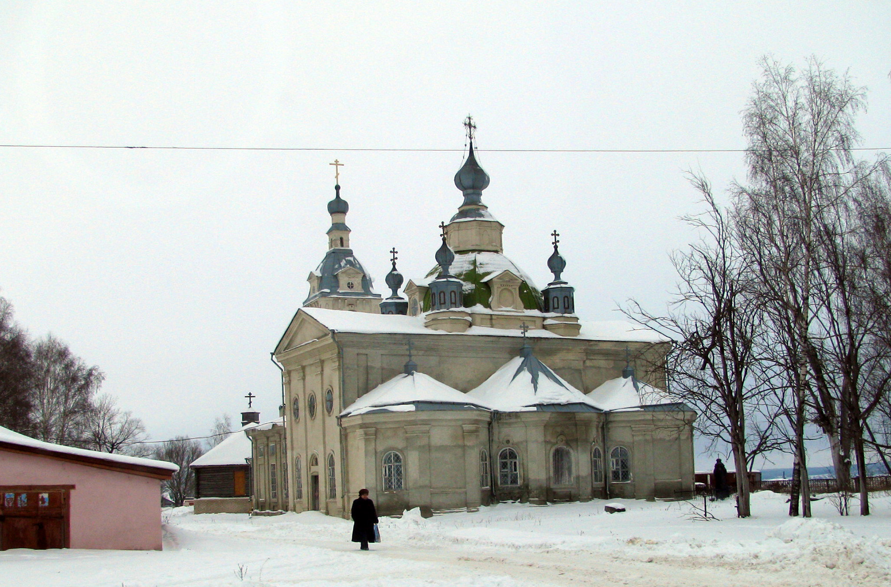 Церковь Покрова Пресвятой Богородицы в с. Кичанзино в Арзамасском районе Нижегородской области.